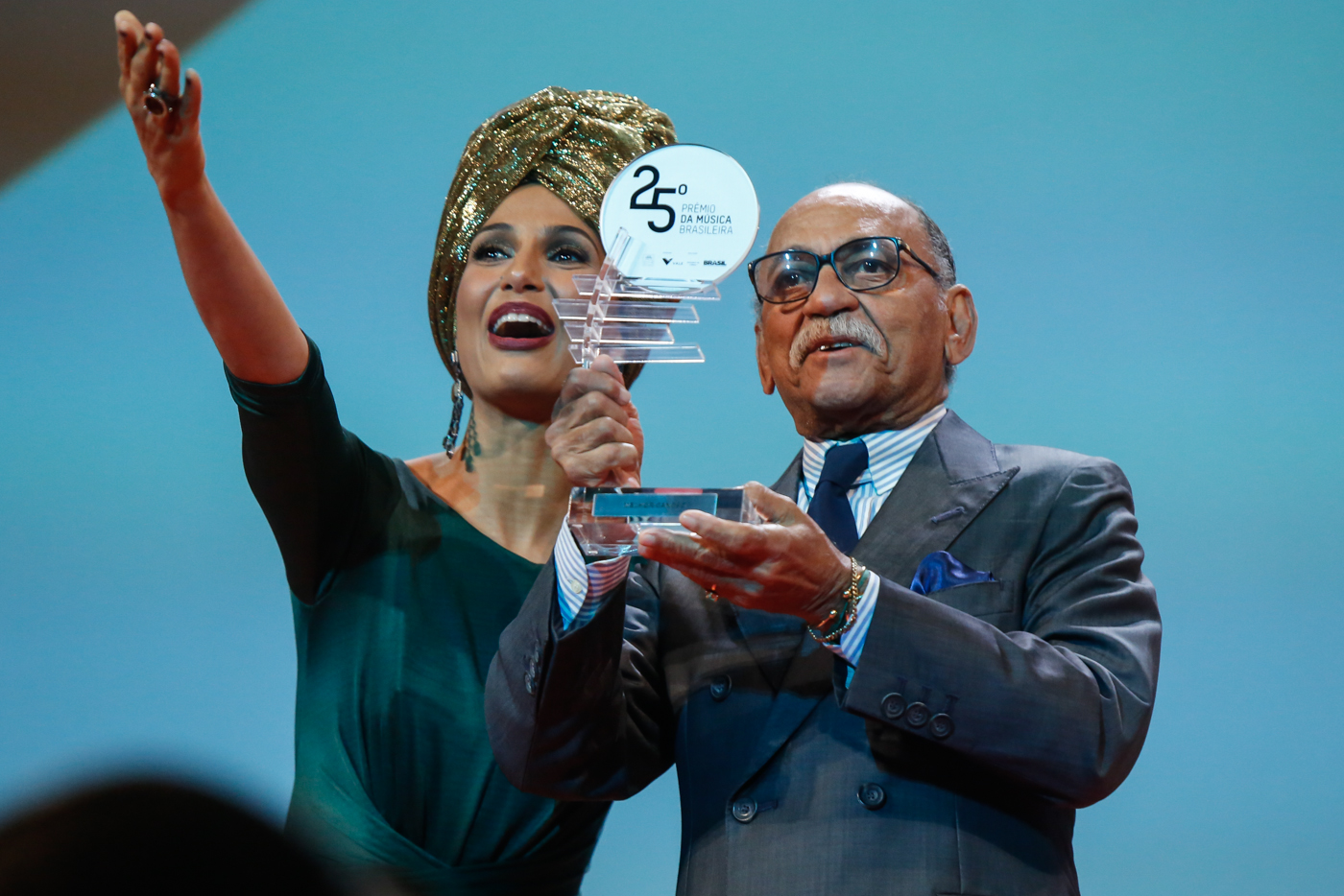 Melhor Cancao - Wilson das Neves durante o 25o Premio da Musica Brasileira no Theatro Municipal. Foto: Roberto Filho (14/05/14)